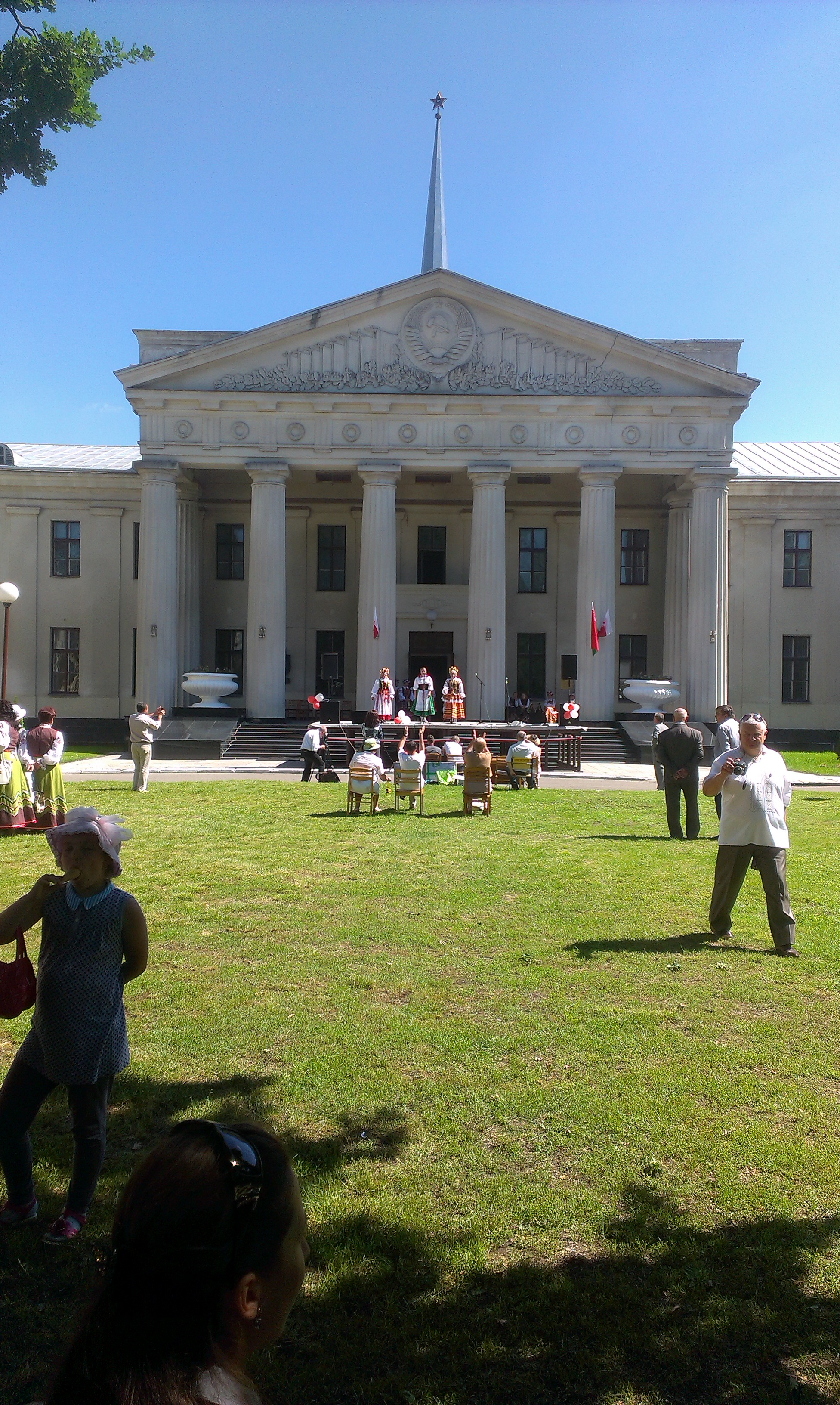 Польскі падворак на X Рэспубліканскім фестывале нацыянальных культур